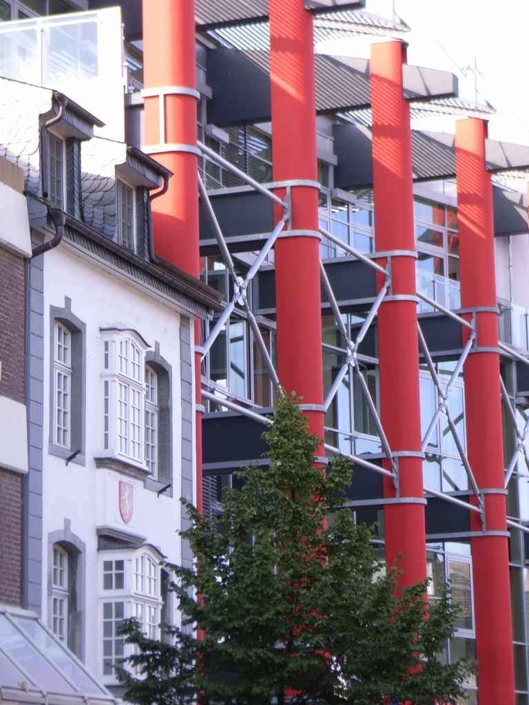 Heinsberg, Hochstraße: ältestes Bürgerhaus von 1635 (fassade 18.Jh) und benachbarter Sparkassenneubau Sie stehen nebeneinander wie von 2 verschiedenen Sternen.